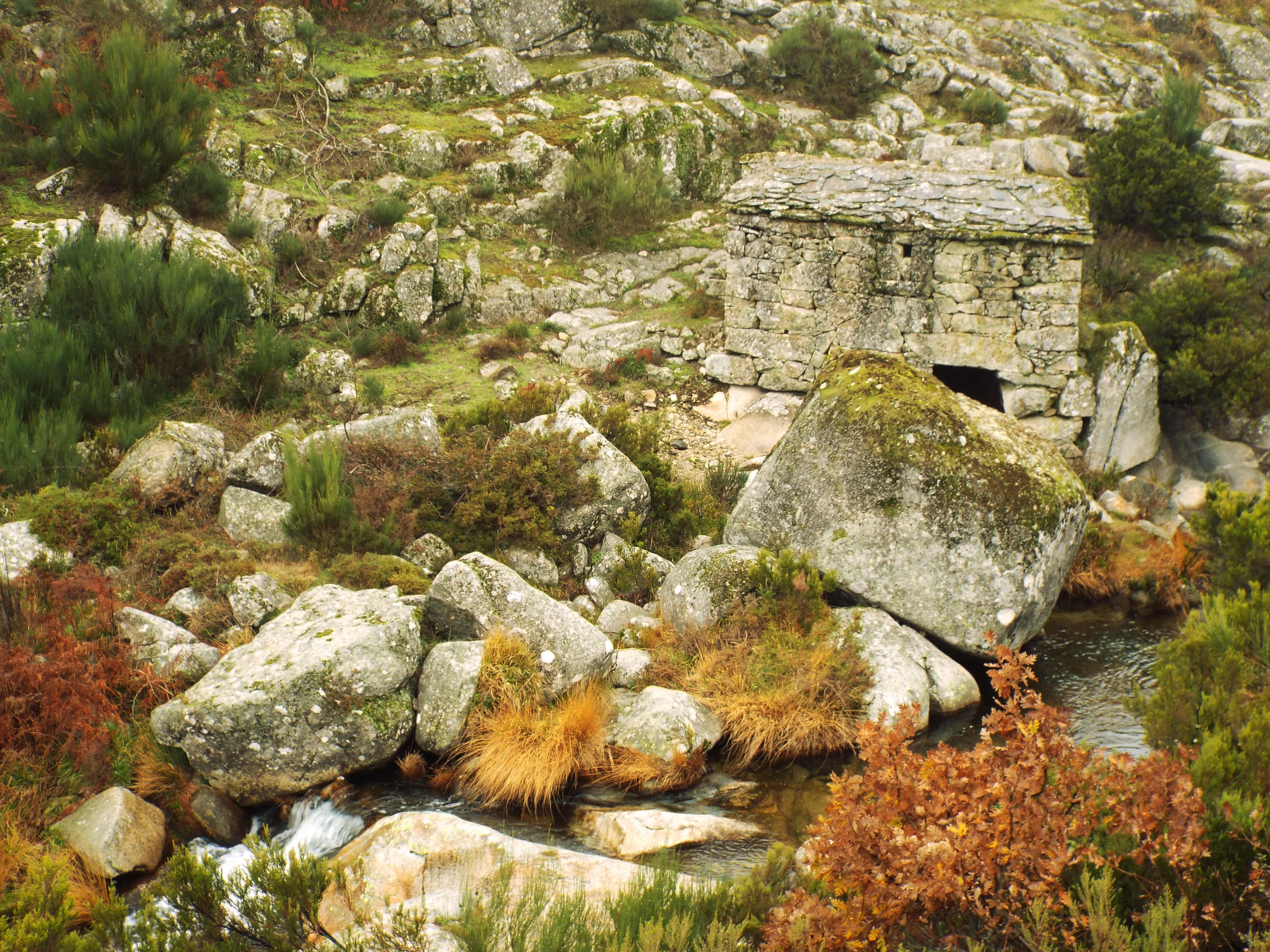 Parque Natural do Alvão